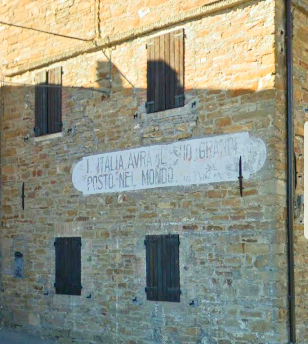 Famosa frase di Benito Mussolini, incisa su una parete di un edificio a Vitriola.